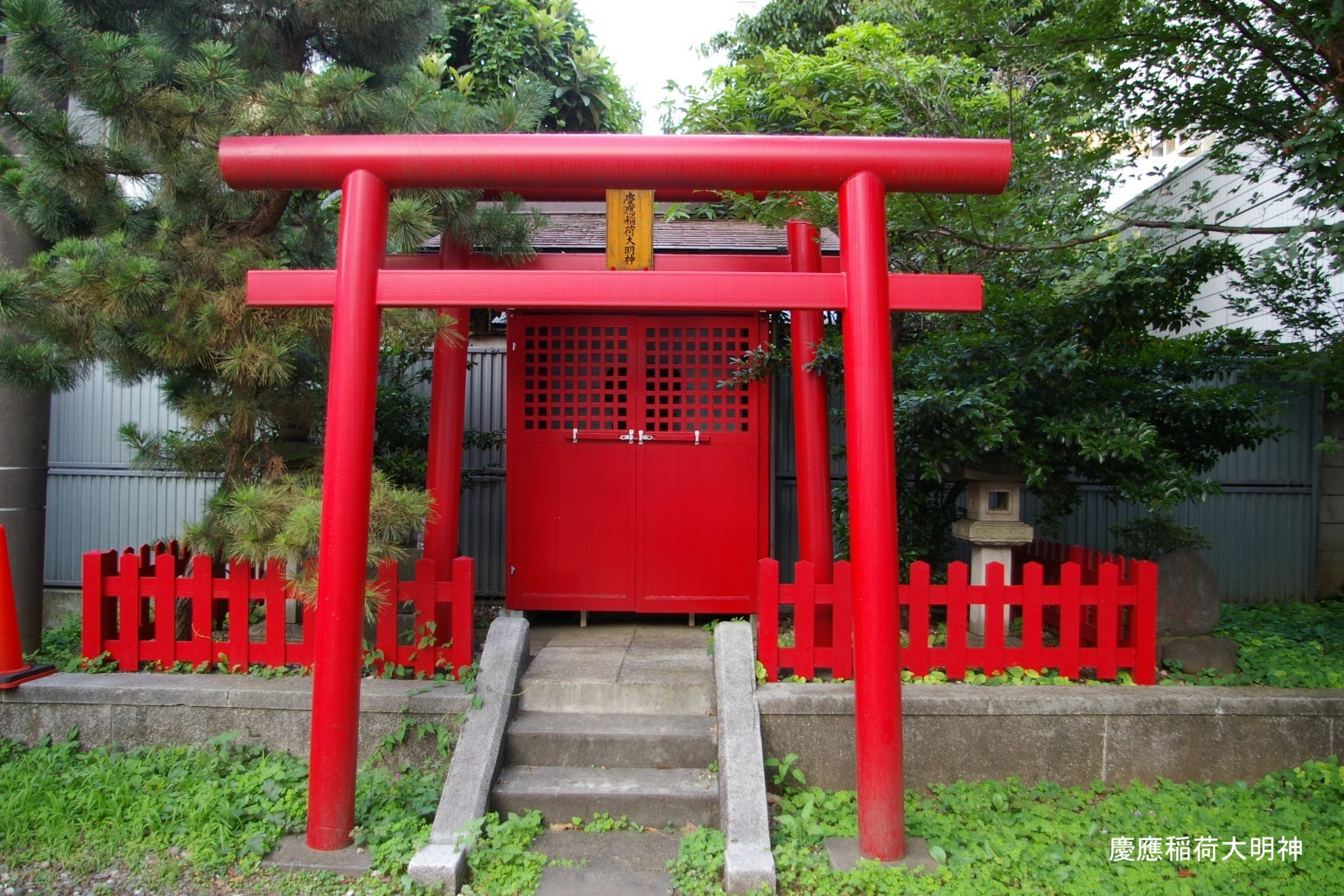 2009.5日本国内で塾生 (talk)が撮影。